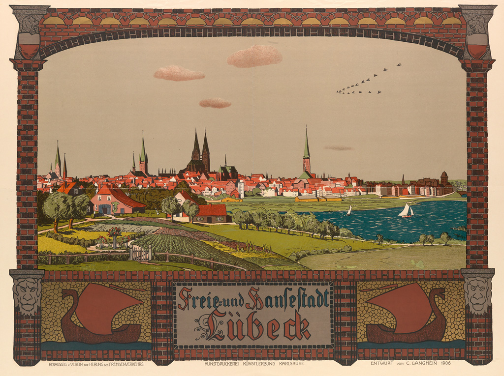 Carl Langhein: Plakat Freie und Hansestadt Lübeck, Kunstdruckerei Künstlerbund Karlsruhe, 1906. Herausgegeben vom Verein zur Hebung des Fremdenverkehrs. 34 1/2 x 45 1/2 inches, 87 1/2 x 115 1/2 cm